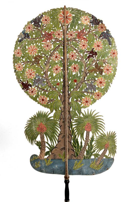 Schaduwfiguur. Deze wajangfiguur stelt een Dewadaru, een hemelboom voor. De naam betekent een gift van de goden. Het is een boom die vooral groeit op de Karimunjawa eilanden ten noorden van Java. Het staat symbool voor de wijsheid van de goden in het handhaven van vrede, stabiliteit en harmonie. De bevolking gelooft dat het hout van de boom geneeskrachtig en beschermend is. Het hout van de boom dient als amulet. Toch durvden de bewoners geen hout of bladeren van de boom buiten het eiland te brengen, omdat ze bang waren dat de schepen die dat vervoerden door ongeluk zouden worden getroffen.. Wajang purwafiguur voorstellend de hemelboom Unknown language: Dewadaru